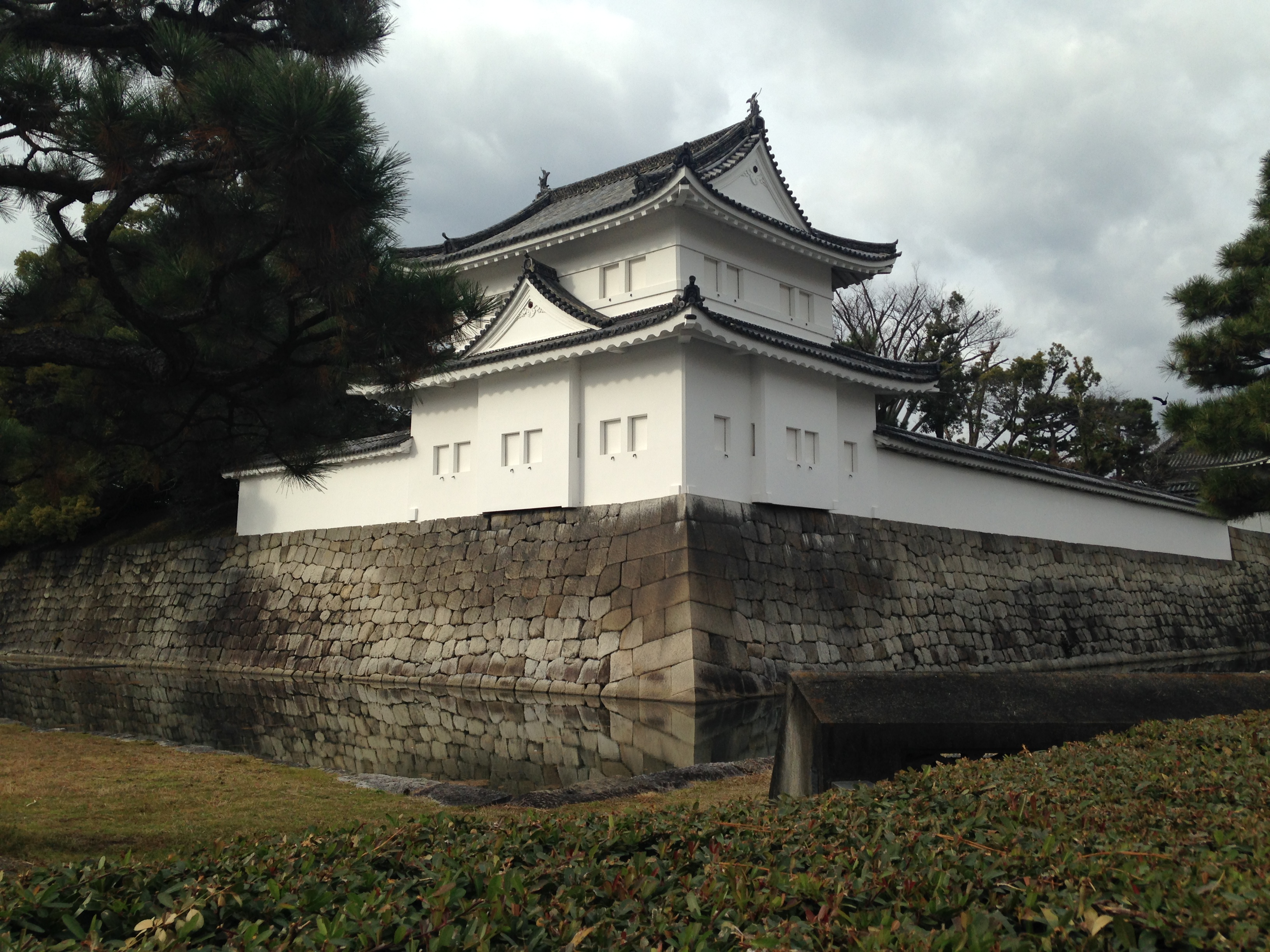 二条城の堀